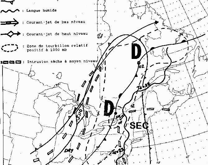 Carte composite météorologique montrant les facteurs présent le matin du 14 juillet 1987 sur l'est du Canada et des États-Unis et qui ont contribués à la formation d'orages violents sur l'Île de Montréal. Ces derniers ont laissé plus de 100 mm en deux heures, inondants le centre-ville et la région autour.